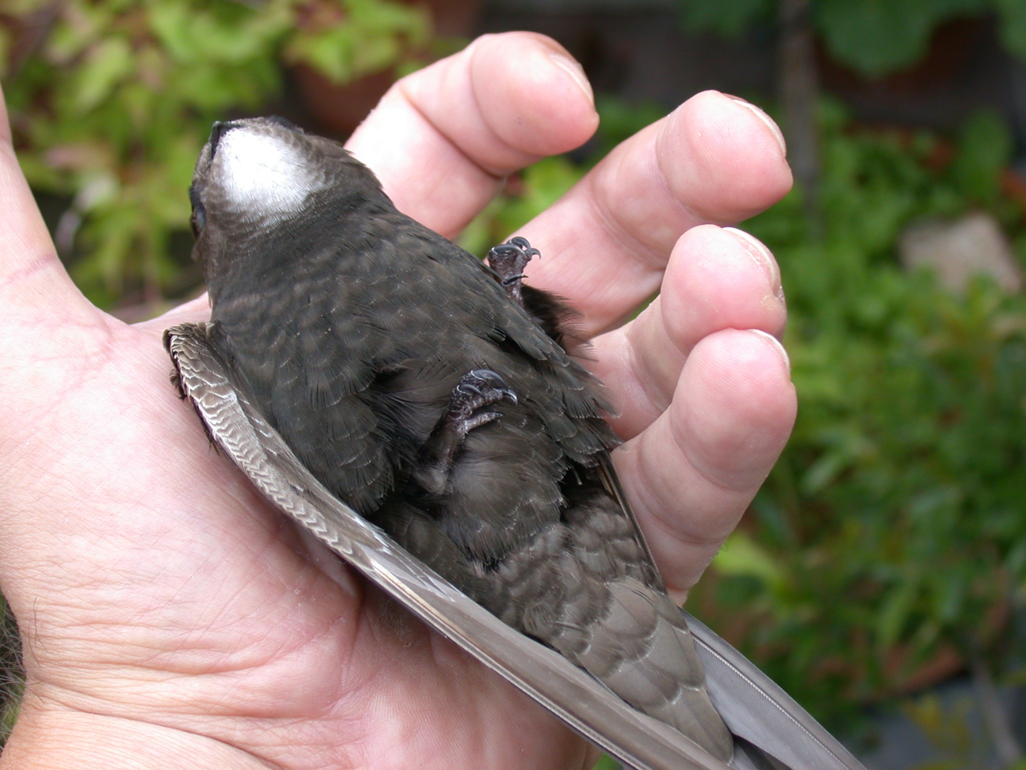 Auf dem Rücken liegender junger Mauersegler